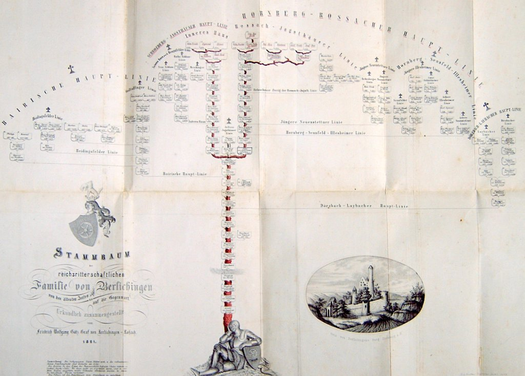 Ist laut Commons:Hirtle chart ok, da älter als 120 Jahre.